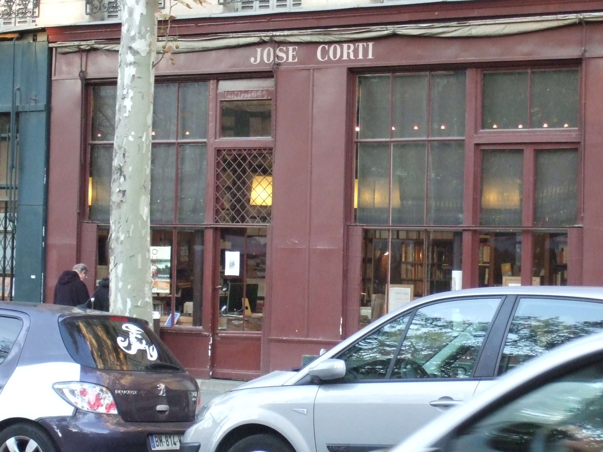 rue de Médicis